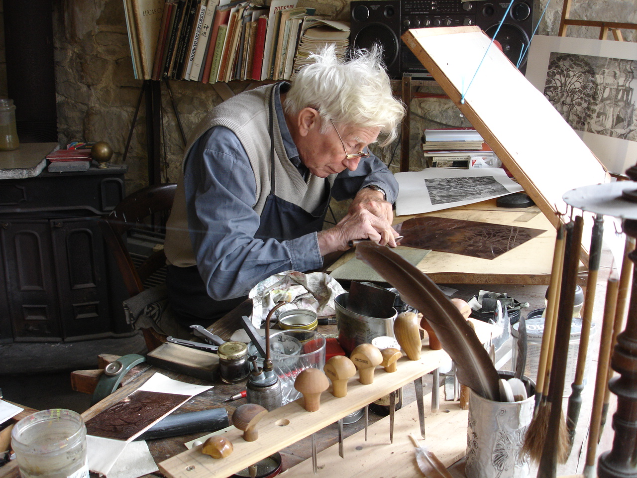 Jacques Houplain dans son atelier des Corbières, en 2007